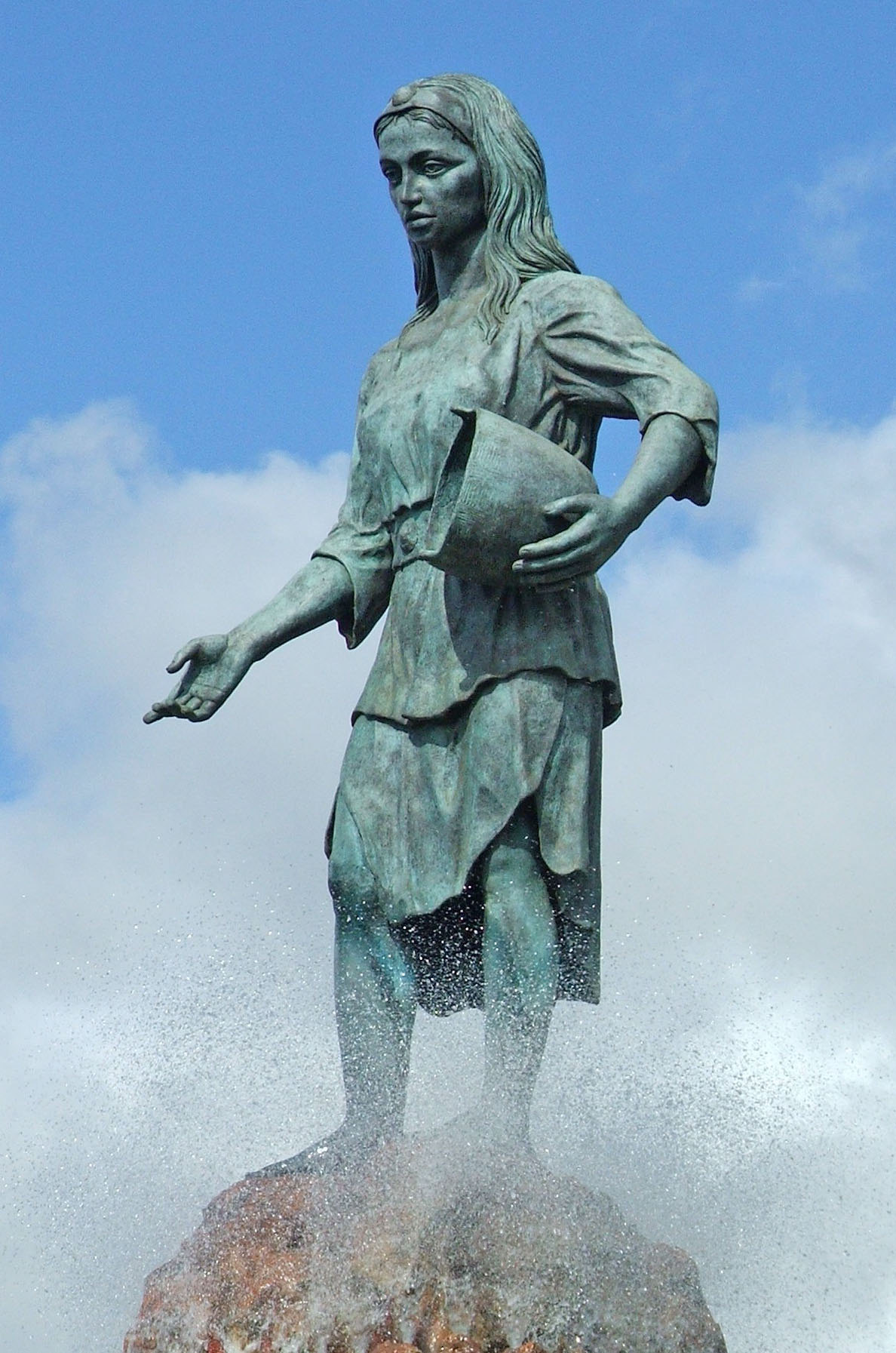 Fuente de la Princesa Dácil situada en la vía de entrada a La Orotava por El Ramal / Estatua creada por los artistas Ezequiel de León Cruz y Cristo Quintero / La princesa Dácil era hija de Bencomo, mencey de Taoro